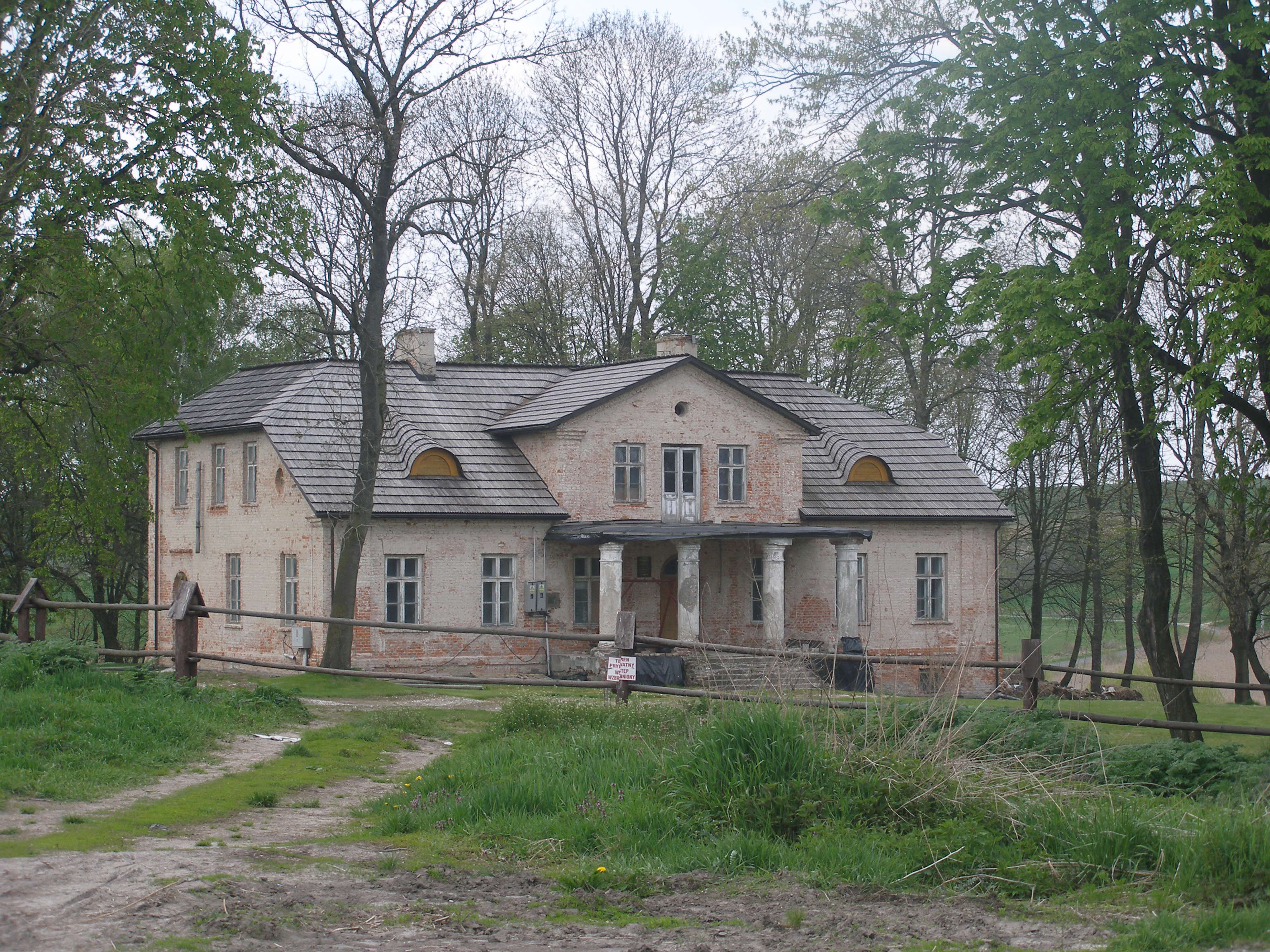 Łaziska - dwór Świdzińskich (zabytek nr A/215 z 5.03.1982)